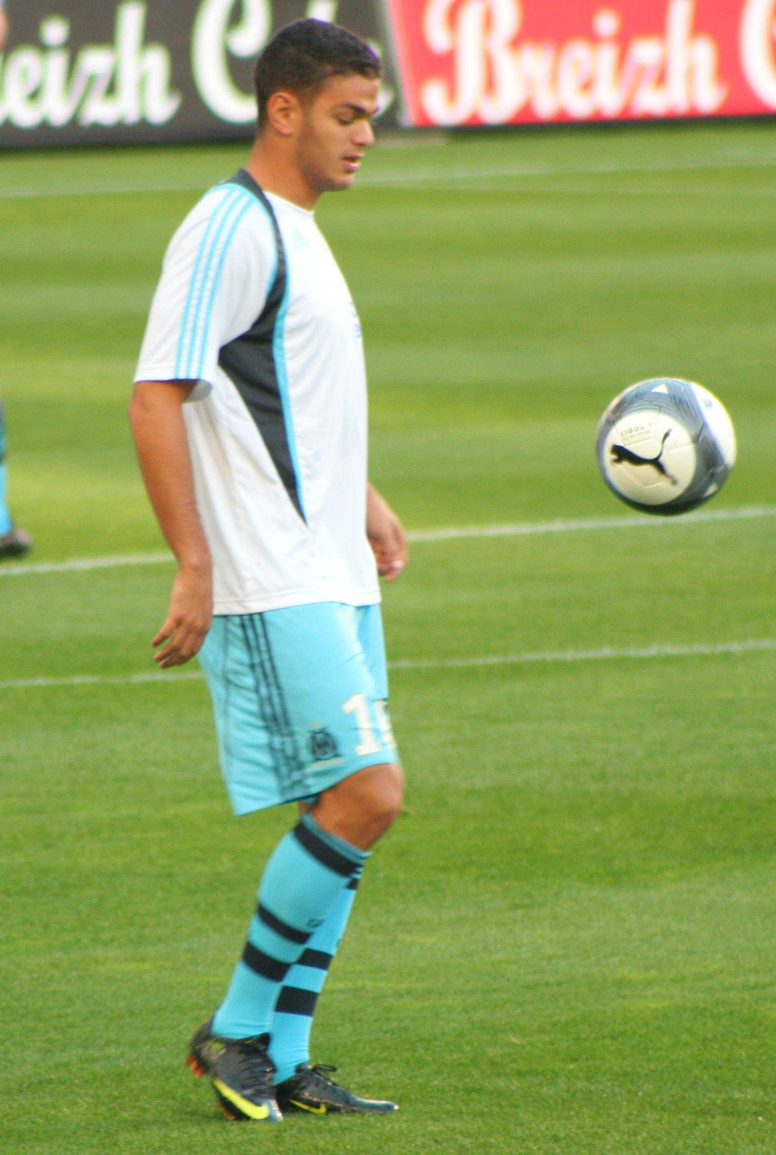 hatem ben arfa sous les couleurs de l'OM à l'echauffement avant le match contre Rennes le 22/08/09